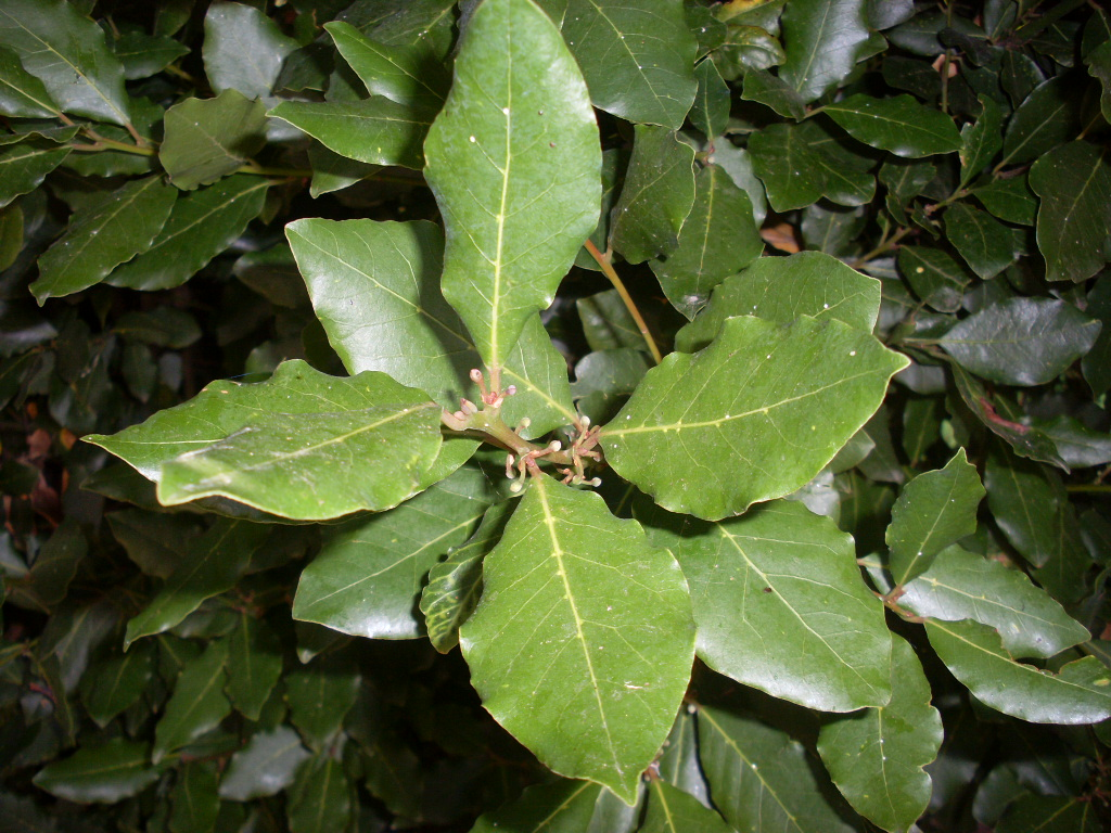 Laurus nobilis Laurier sauce, feuillage